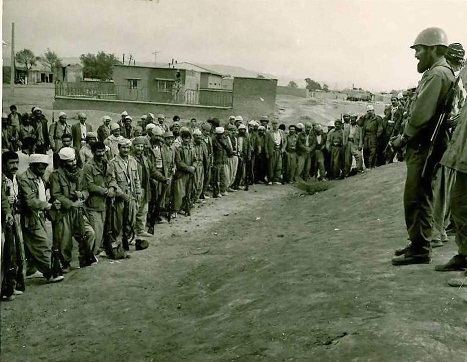 اسماعیل ططری در حضور افراد گمجن عشایری